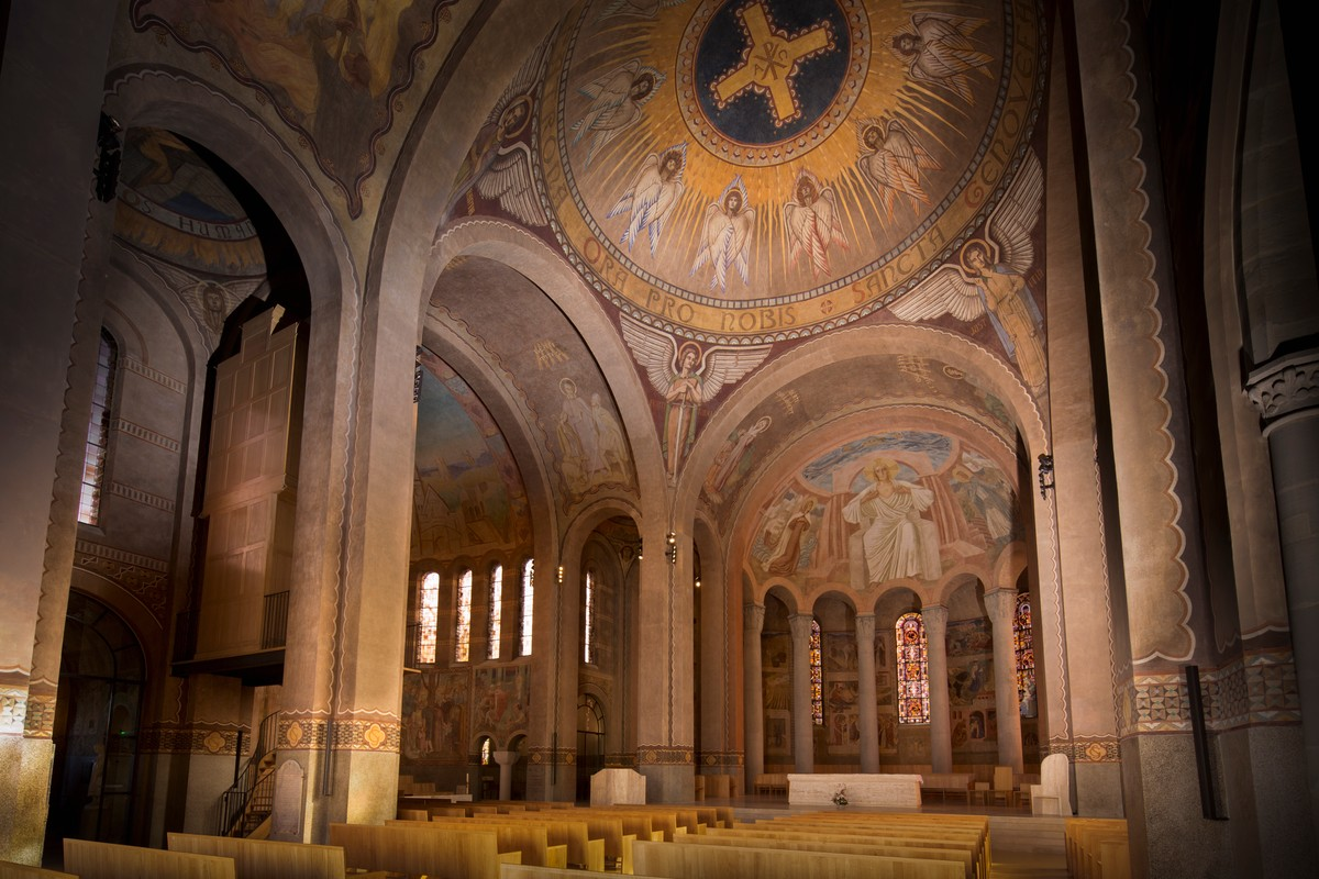 photo Benoît GUEUDET